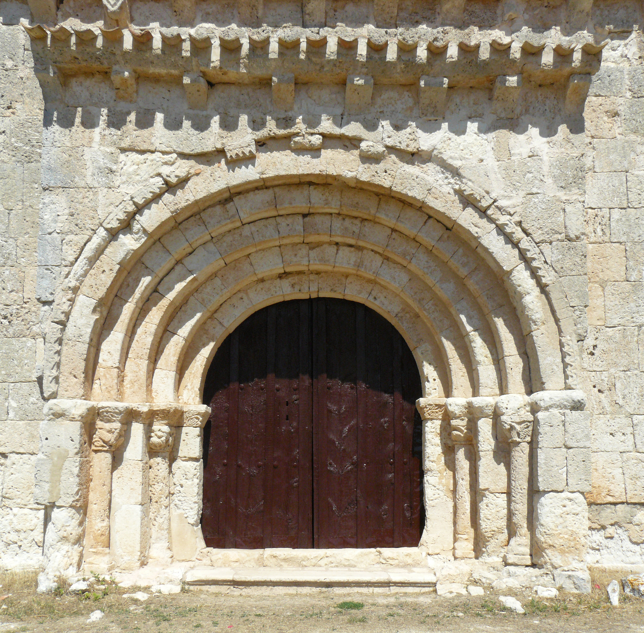 Santibáñez de Esgueva, Burgos.